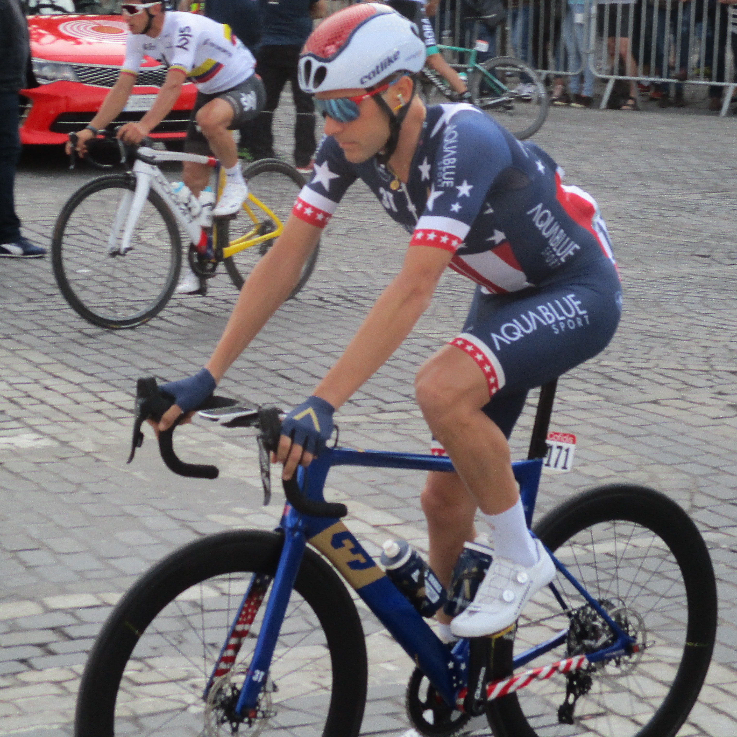 Start van Luik-Bastenaken-Luik 2018 in Luik.